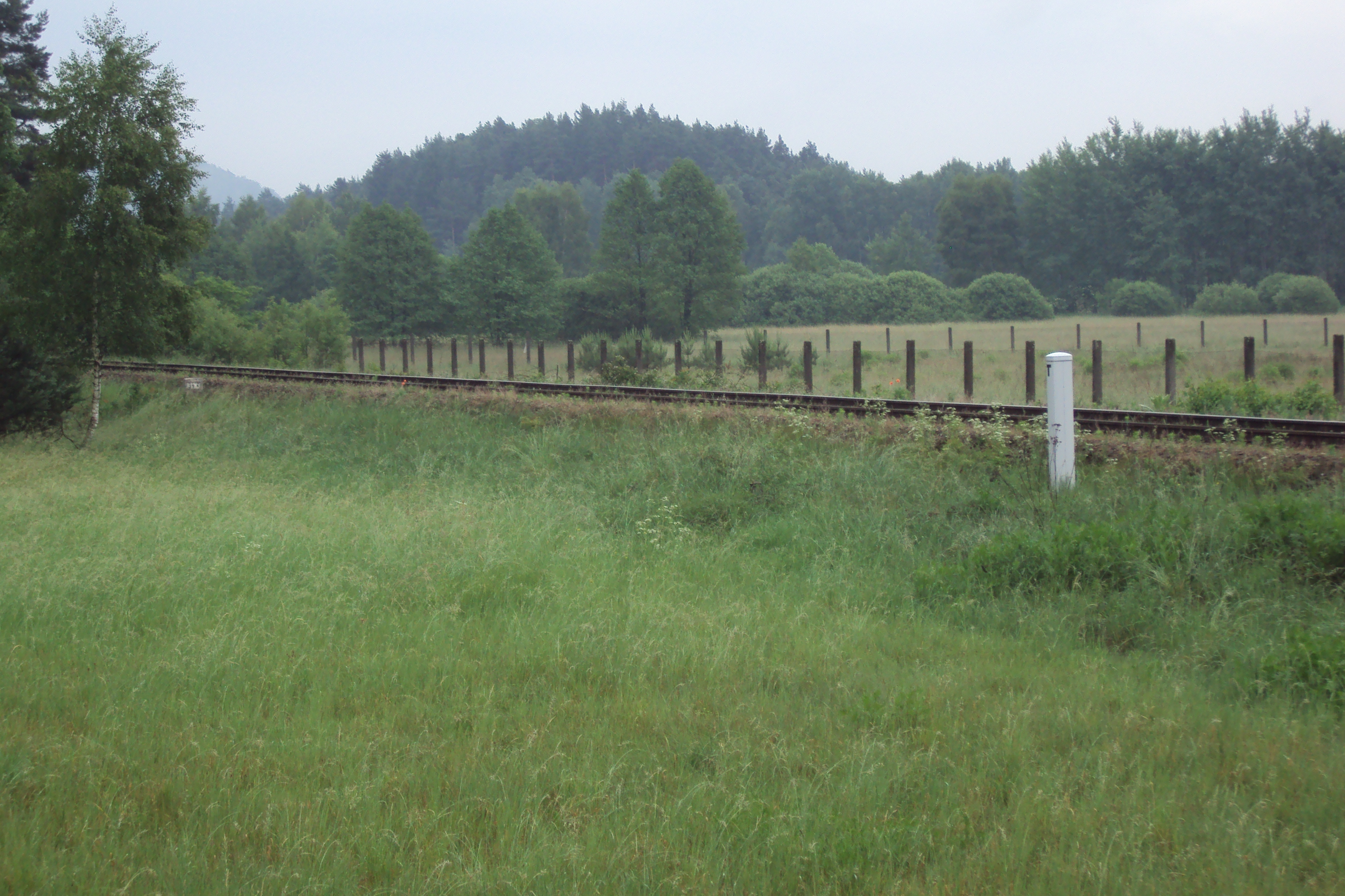 Konvalinkový vrch od trati z České Lípy do Starých Splavů